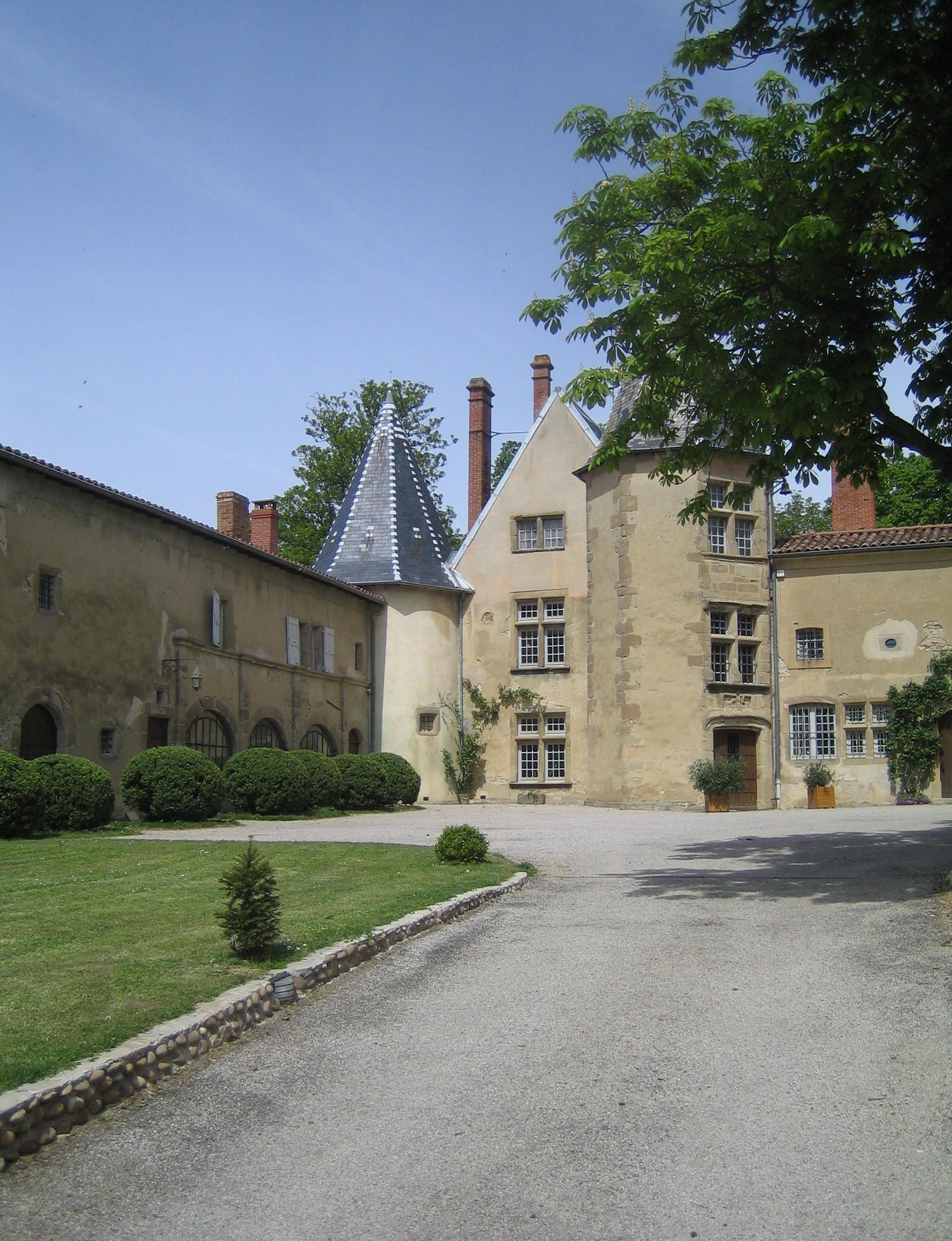 château de la Bretonnière à Mureils dans la Drôme